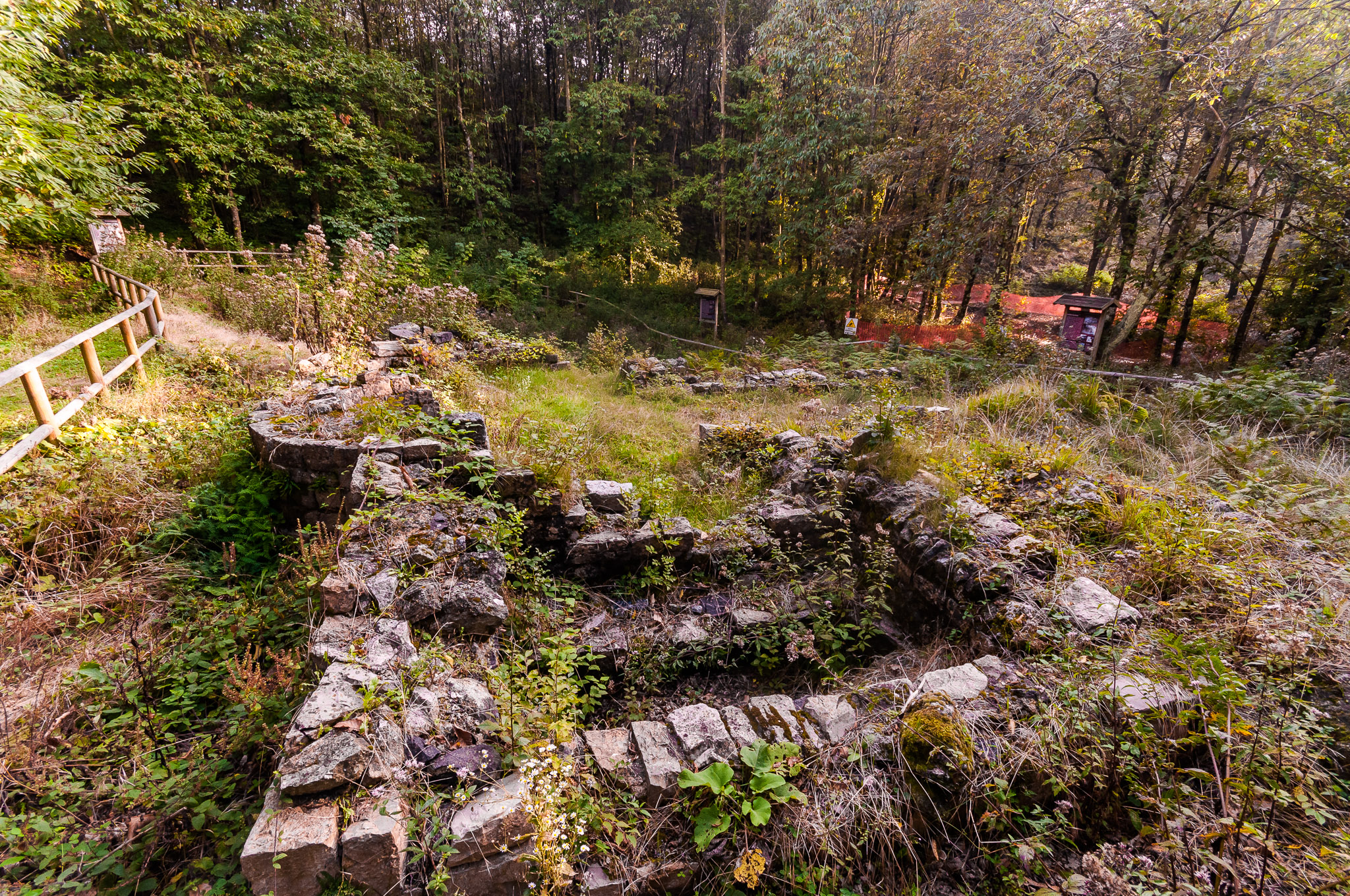 Chiesa di San Nicolao di Pietra Colice, particolare del transetto